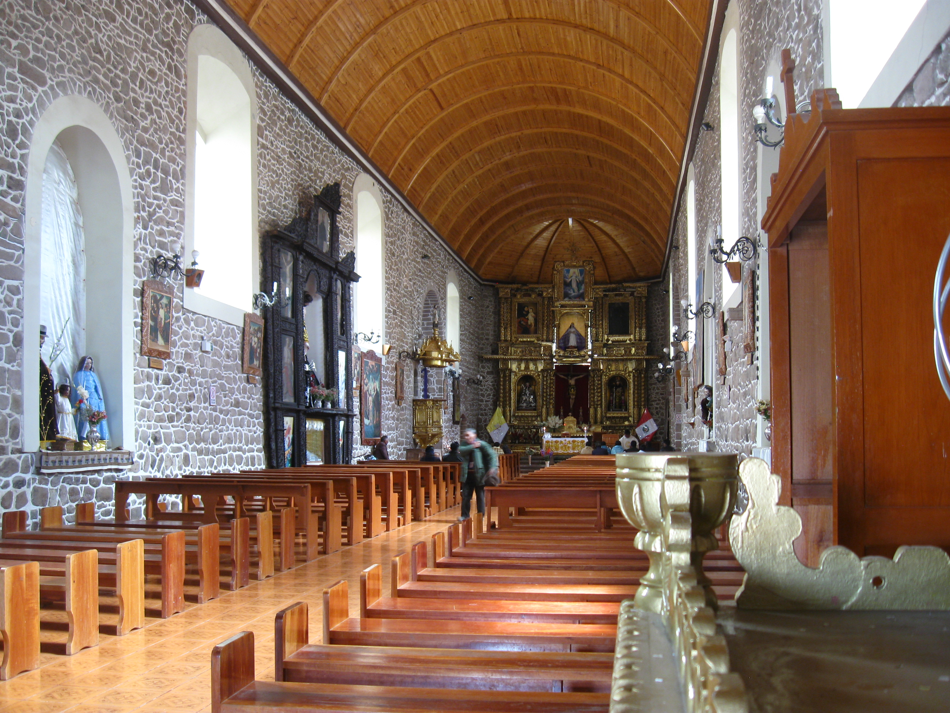 Interior de la iglesia principal de Yunguyo, en Puno, Perú.